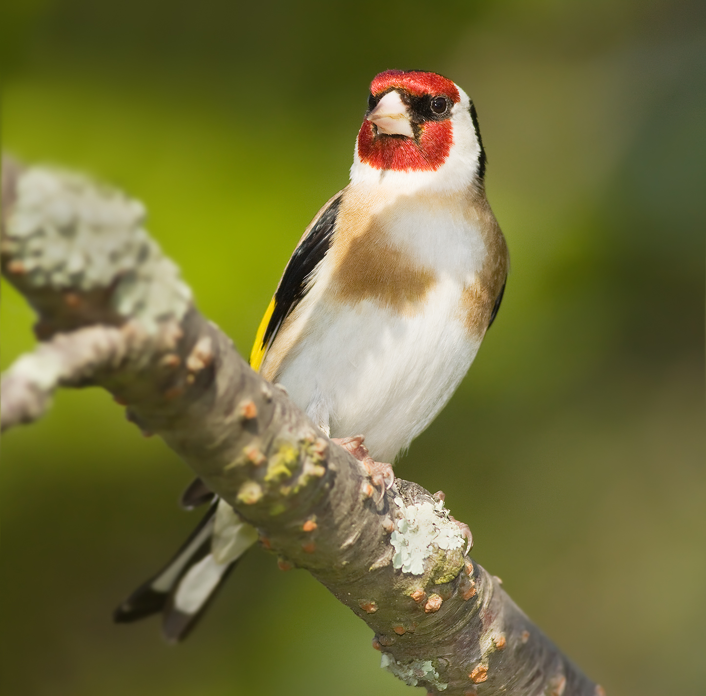 1.2 only